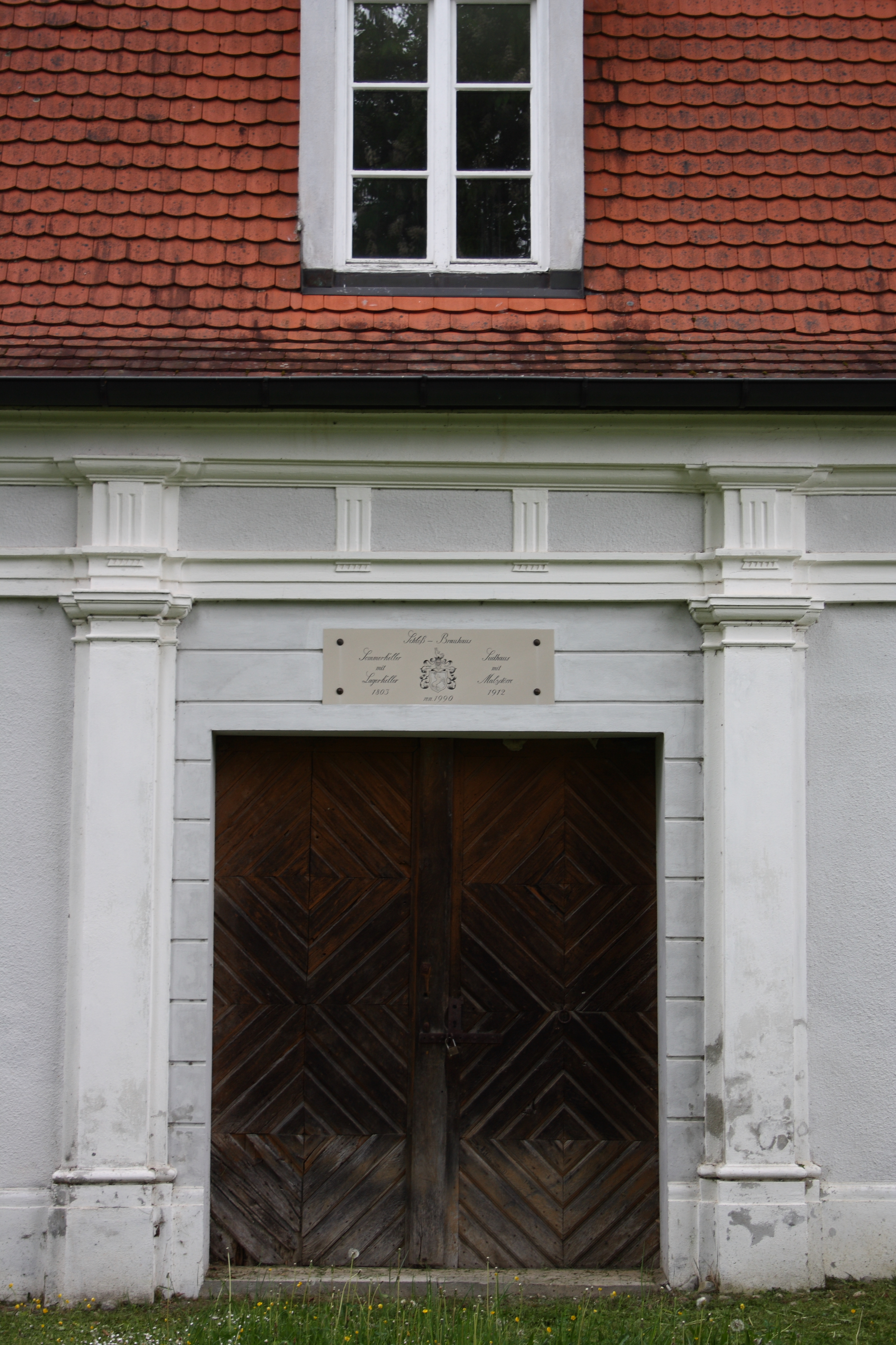 katholische Kapelle St. Alexander in Harthausen, einem Ortsteil von Rettenbach im Landkreis Günzburg (Bayern), St.-Alexander-Straße 11